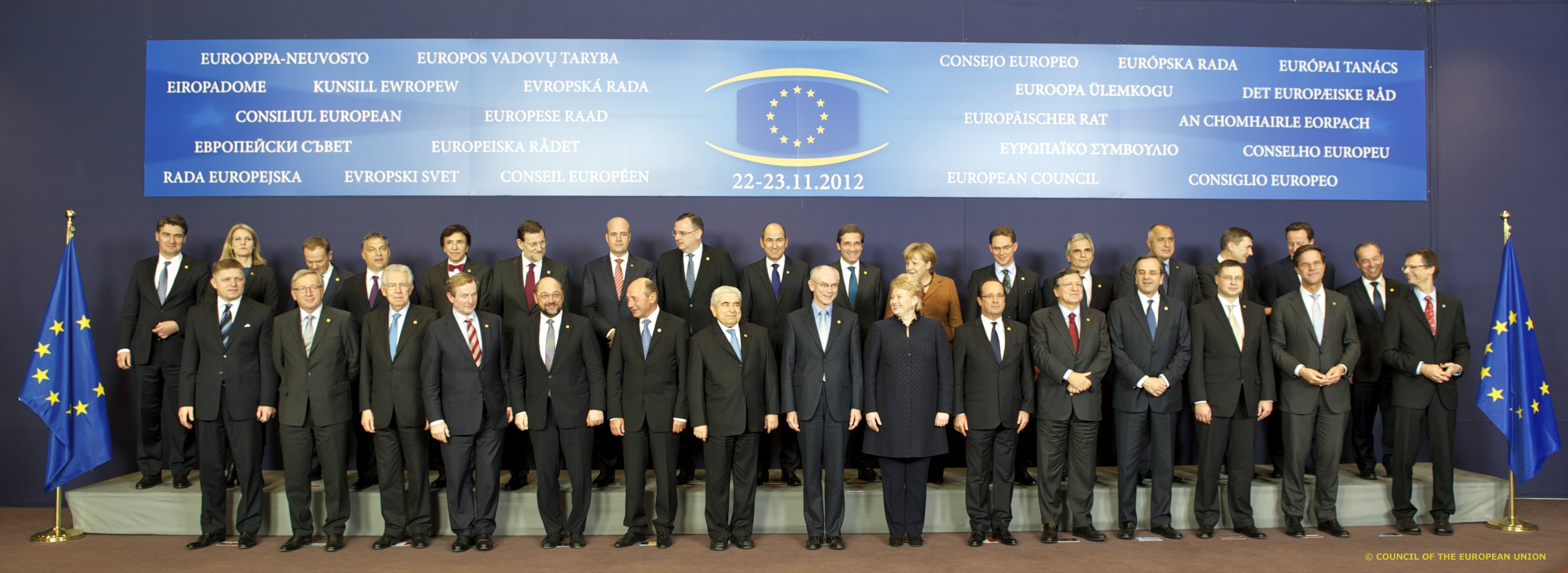 Ministru prezidents Valdis Dombrovskis Briselē piedalās Eiropadomes sanāksmē, kurā valstu līderi diskutē par nākamo ES daudzgadu budžetu no 2014.-2020. gadam Foto: The Council of the European Union